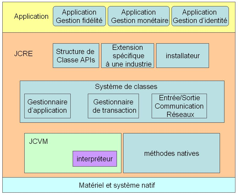 javacard architecture